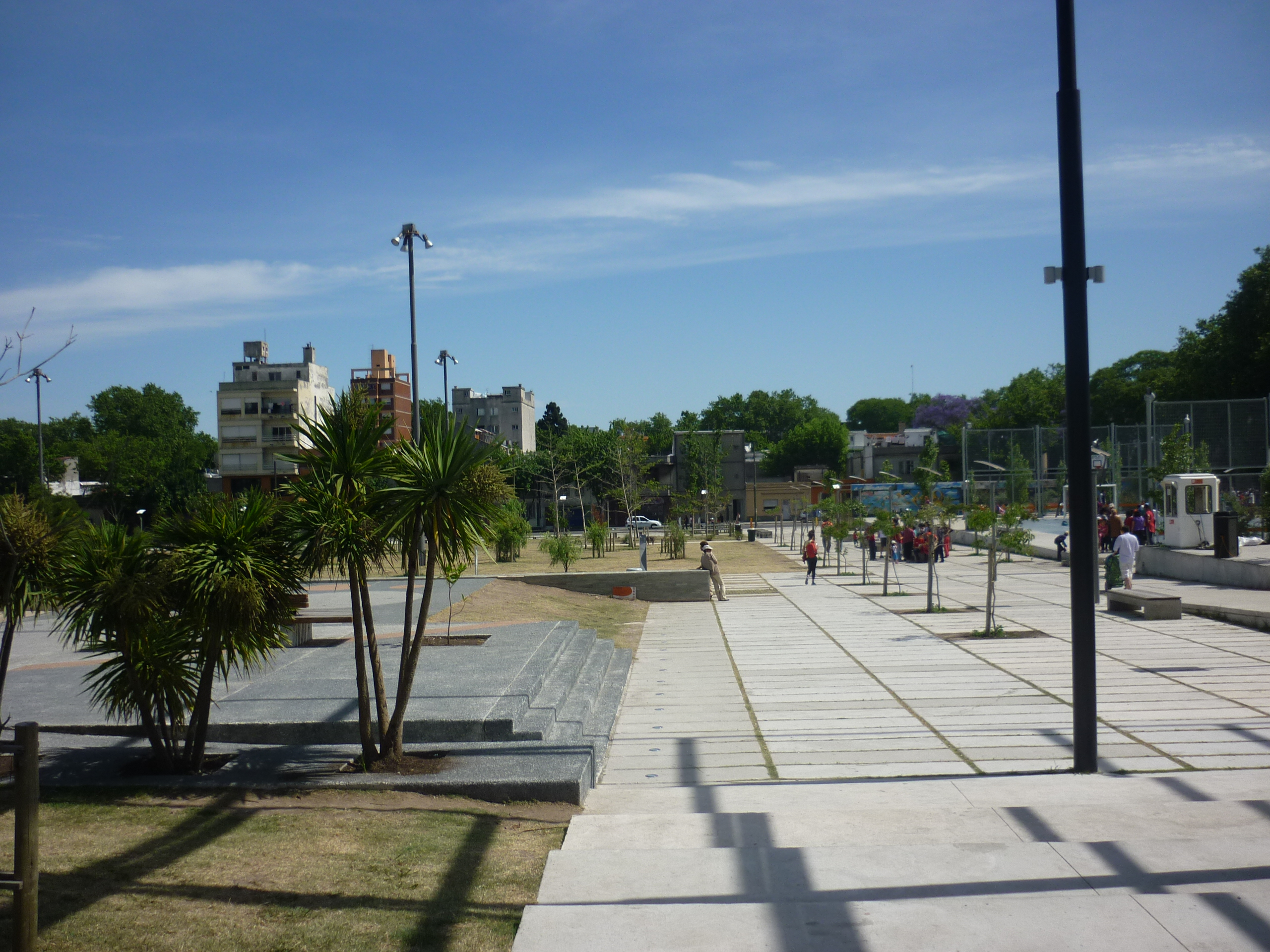 Vista del Parque Líber Seregni hacia el norte.